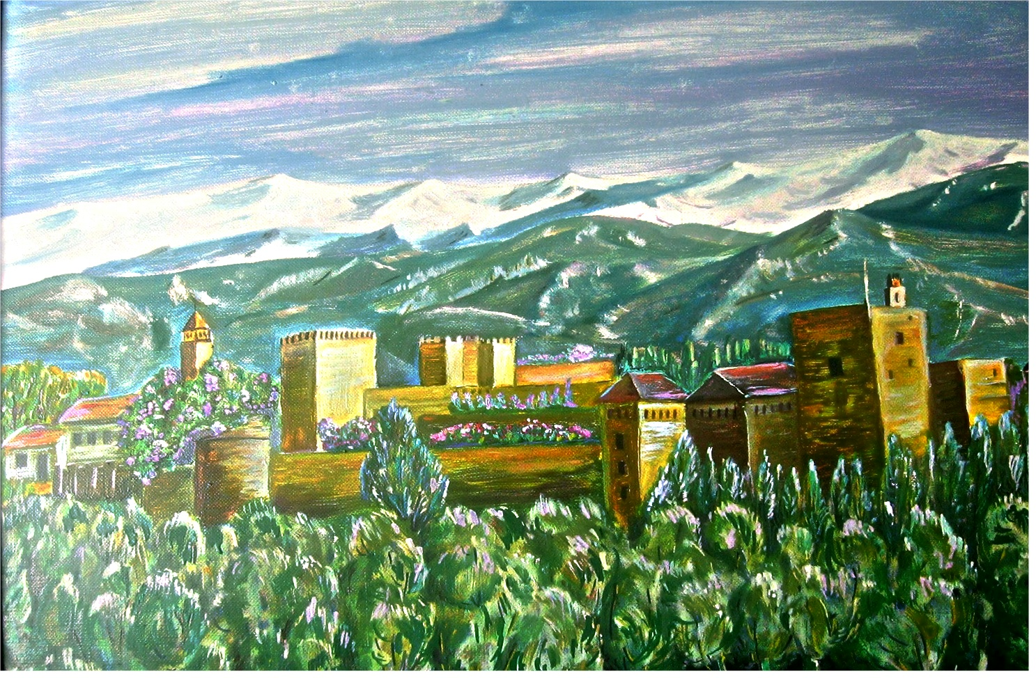 De Alhambra in Granada